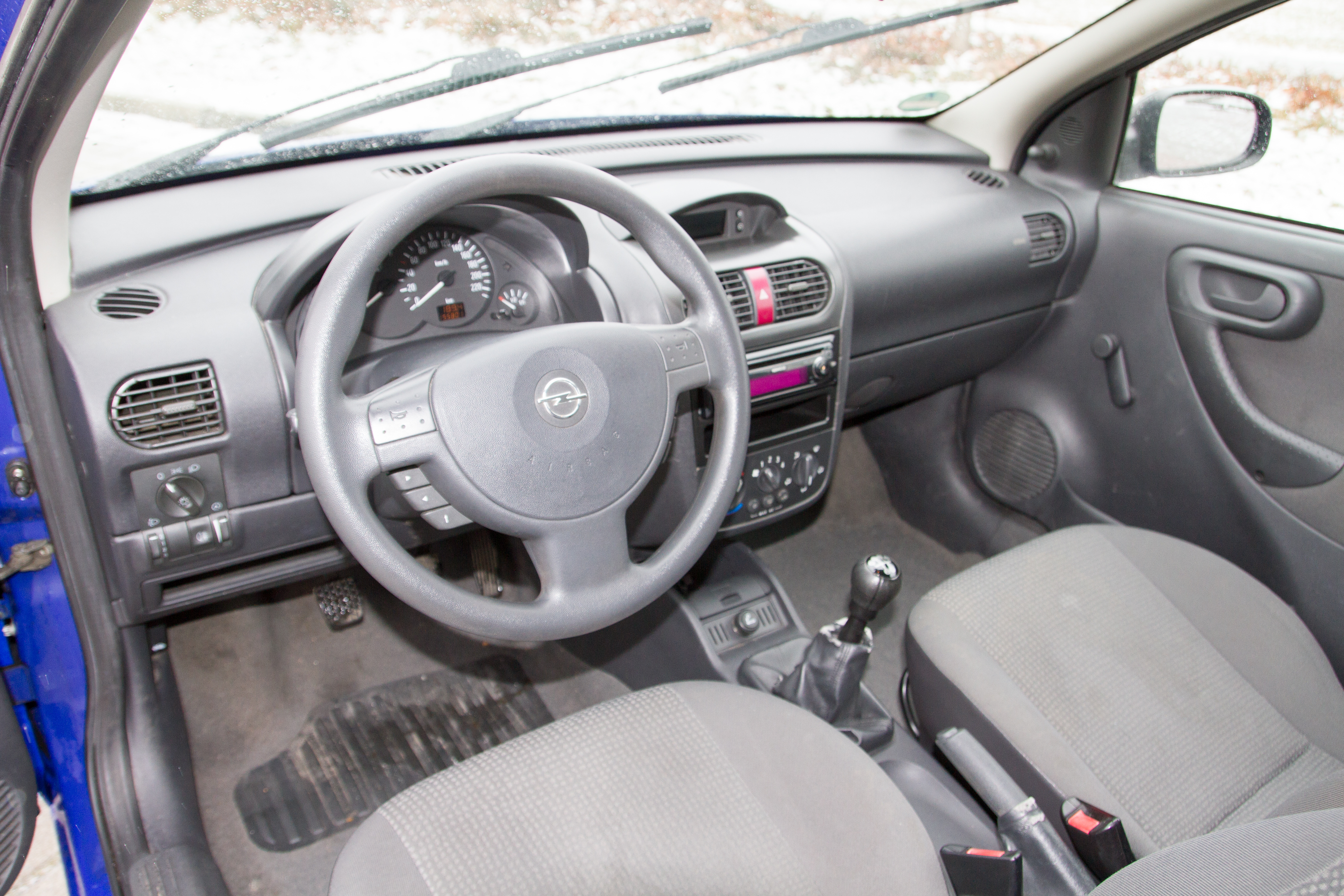 Opel Corsa C, anschicht von Innen.